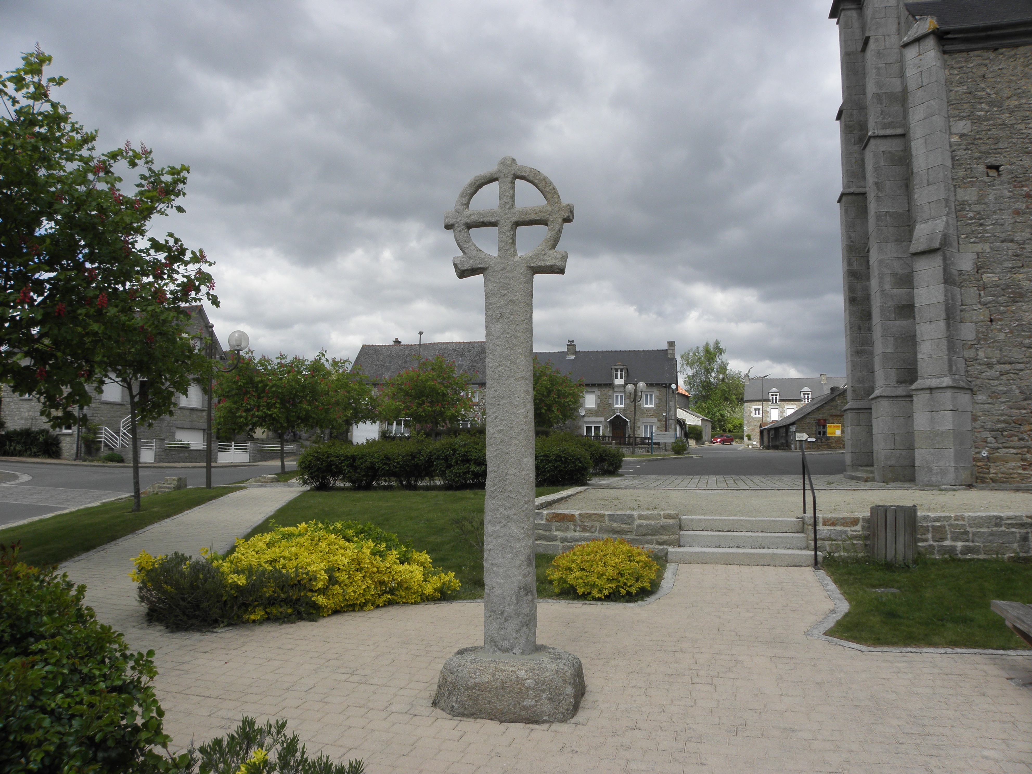 Croix nimbée , place de l'église de Trévron